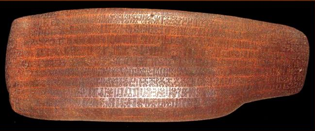 Verso of rongorongo Tablet B, Aruku Kurenga.